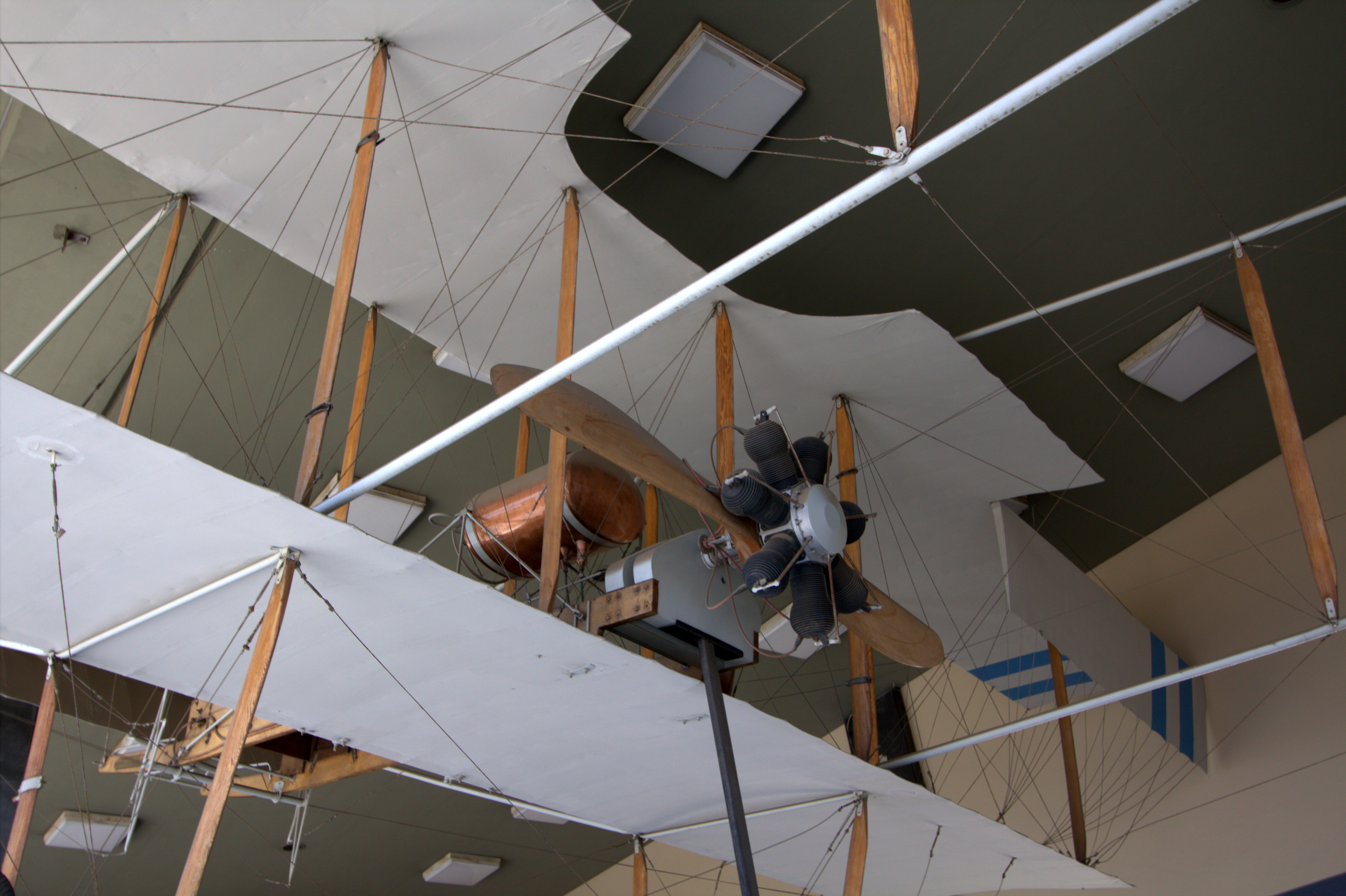 Hellenic War Museum (Athens, Greece). --- Πανομοιότυπο του πρώτου Ελληνικού πολεμικού αεροπλάνου "Δαίδαλος". Πολεμικό Μουσείο Ελλάδος. Αθήνα.